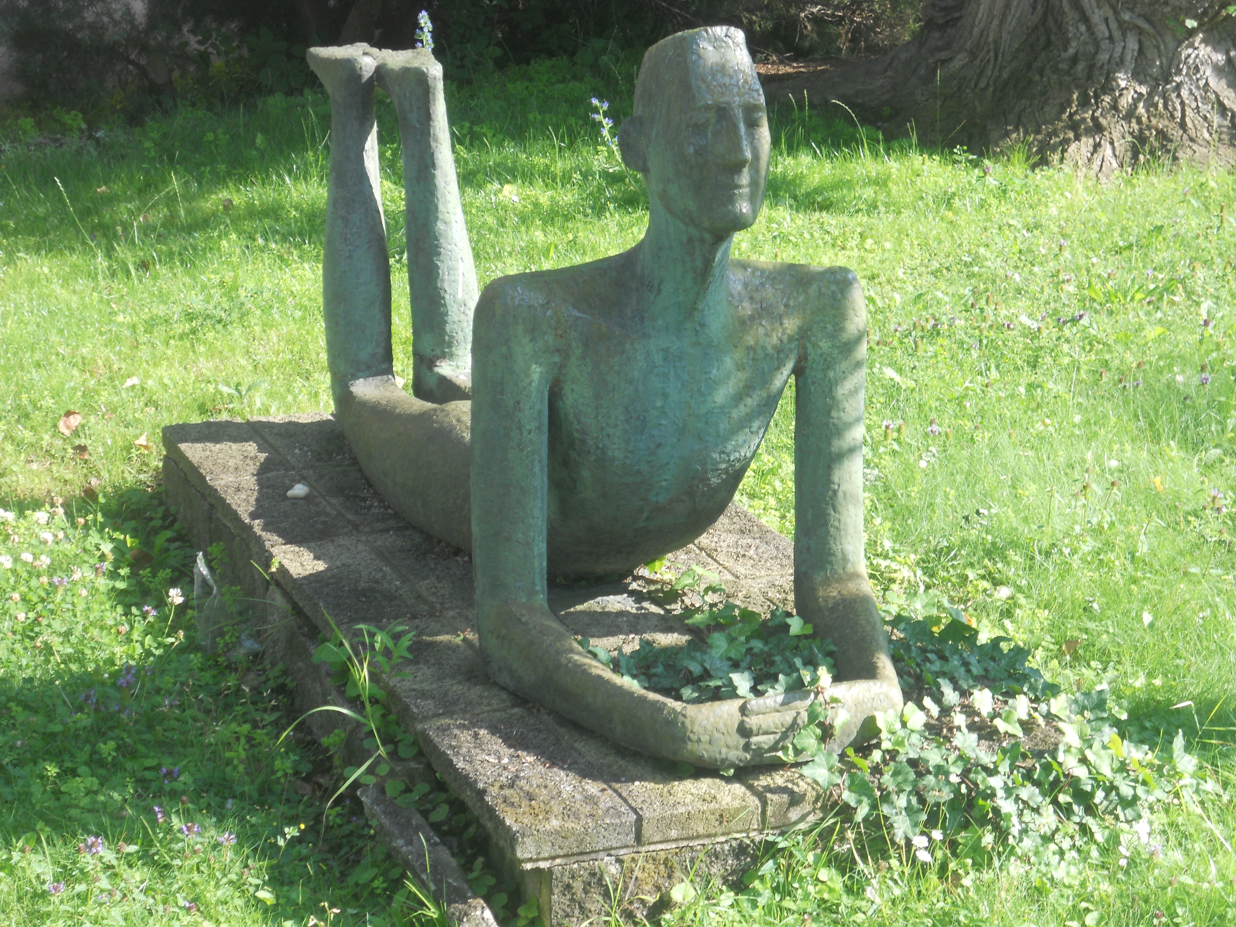 Bronzeplastik "Sich Sonnender" von Eva Mazzucco im Strandbad Alte Donau Object location48° 14′ 33.32″ N, 16° 25′ 02.68″ E